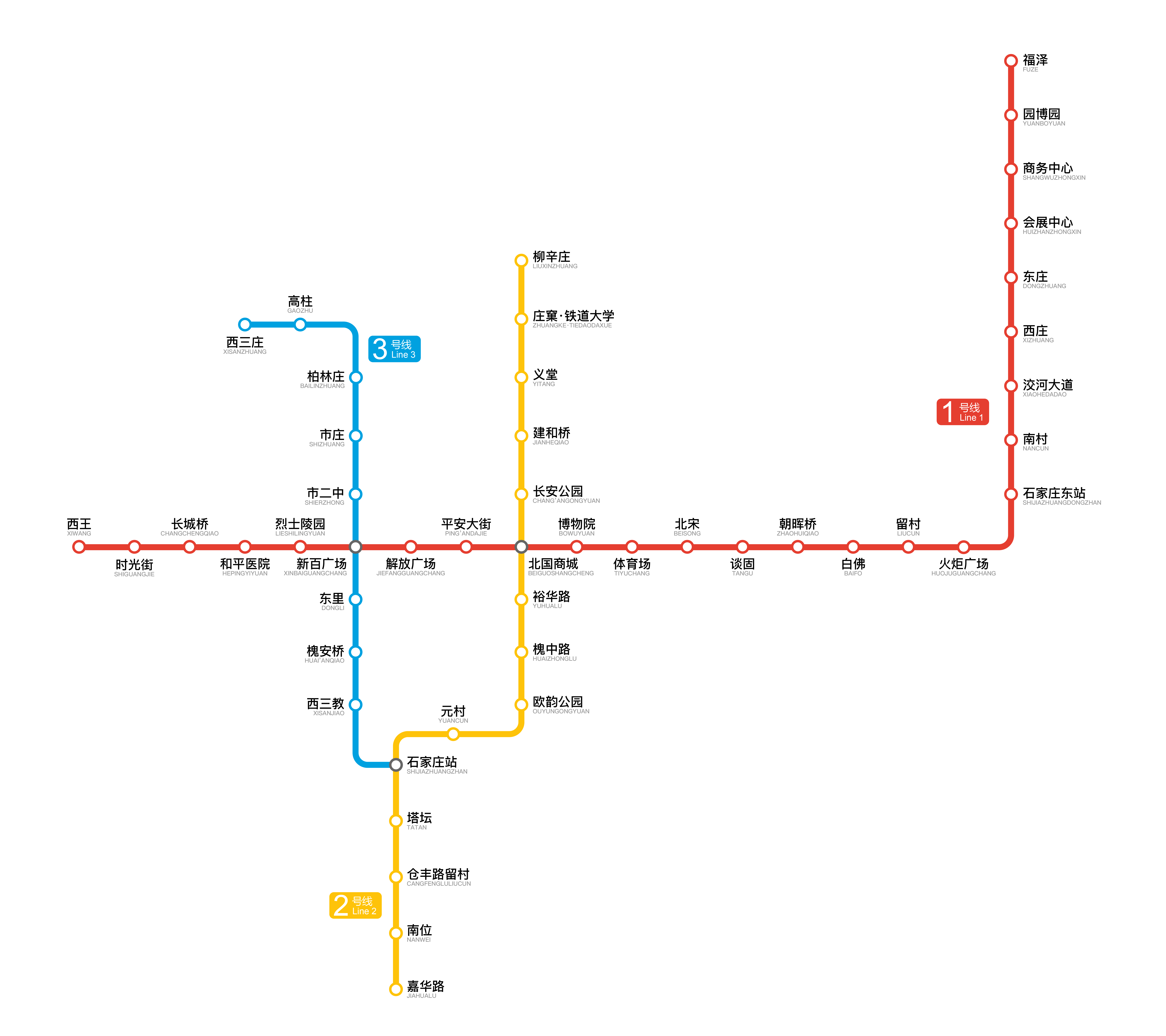 石家庄地铁2017年运营线路图